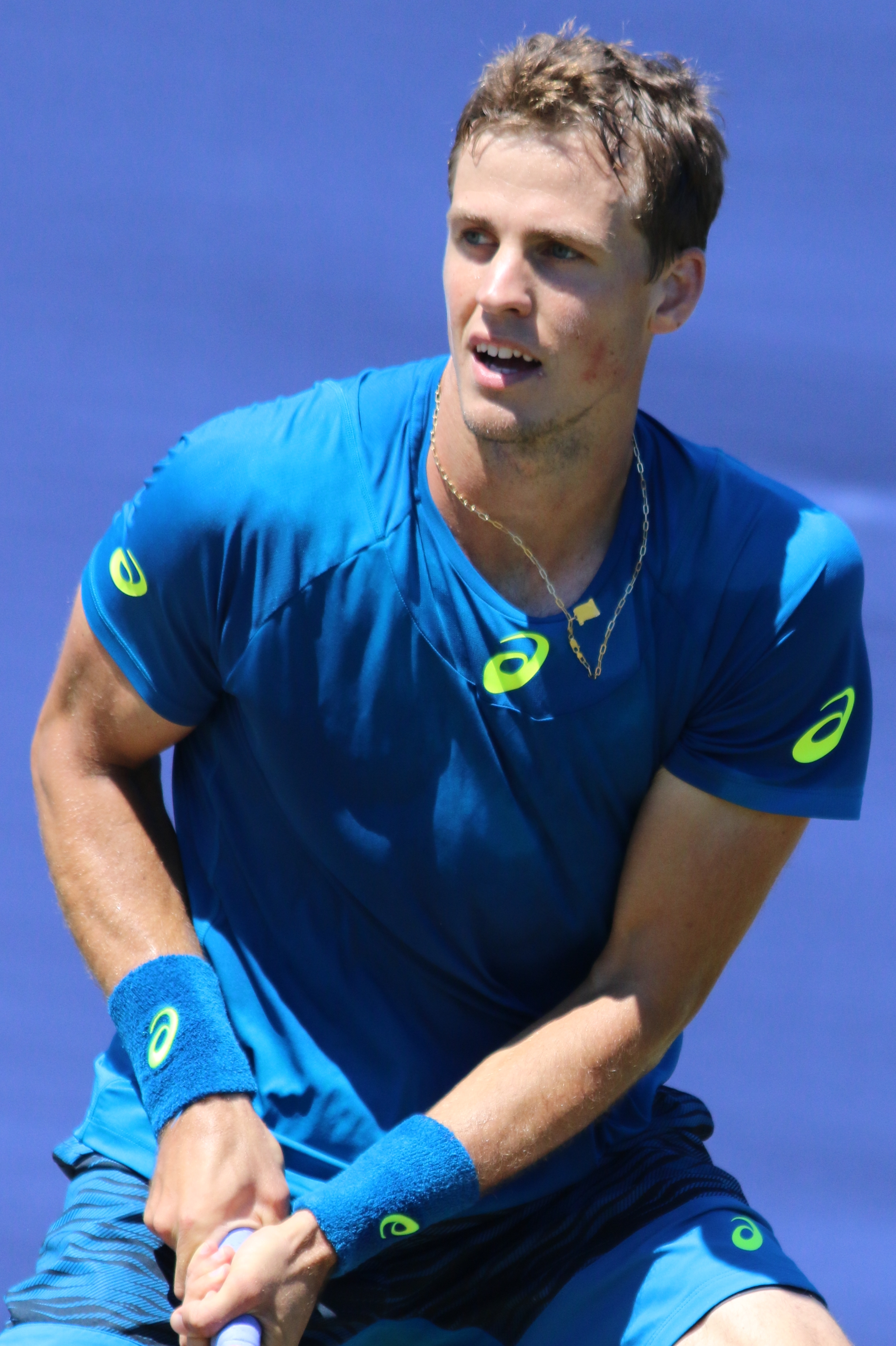 Pospisil EBN17 (16)